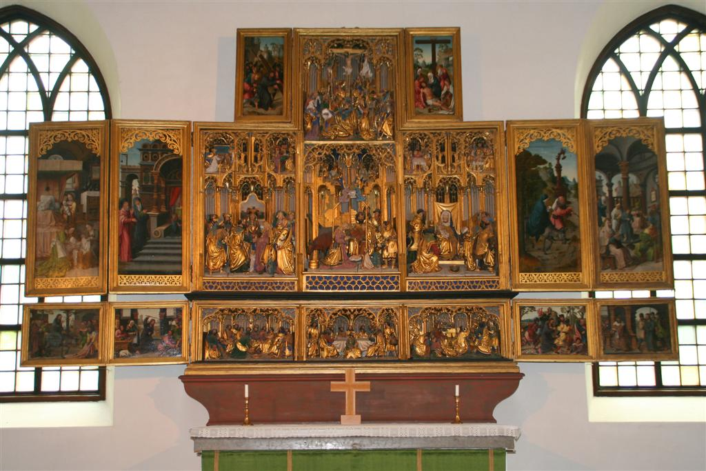 Foto: Tor Svensson